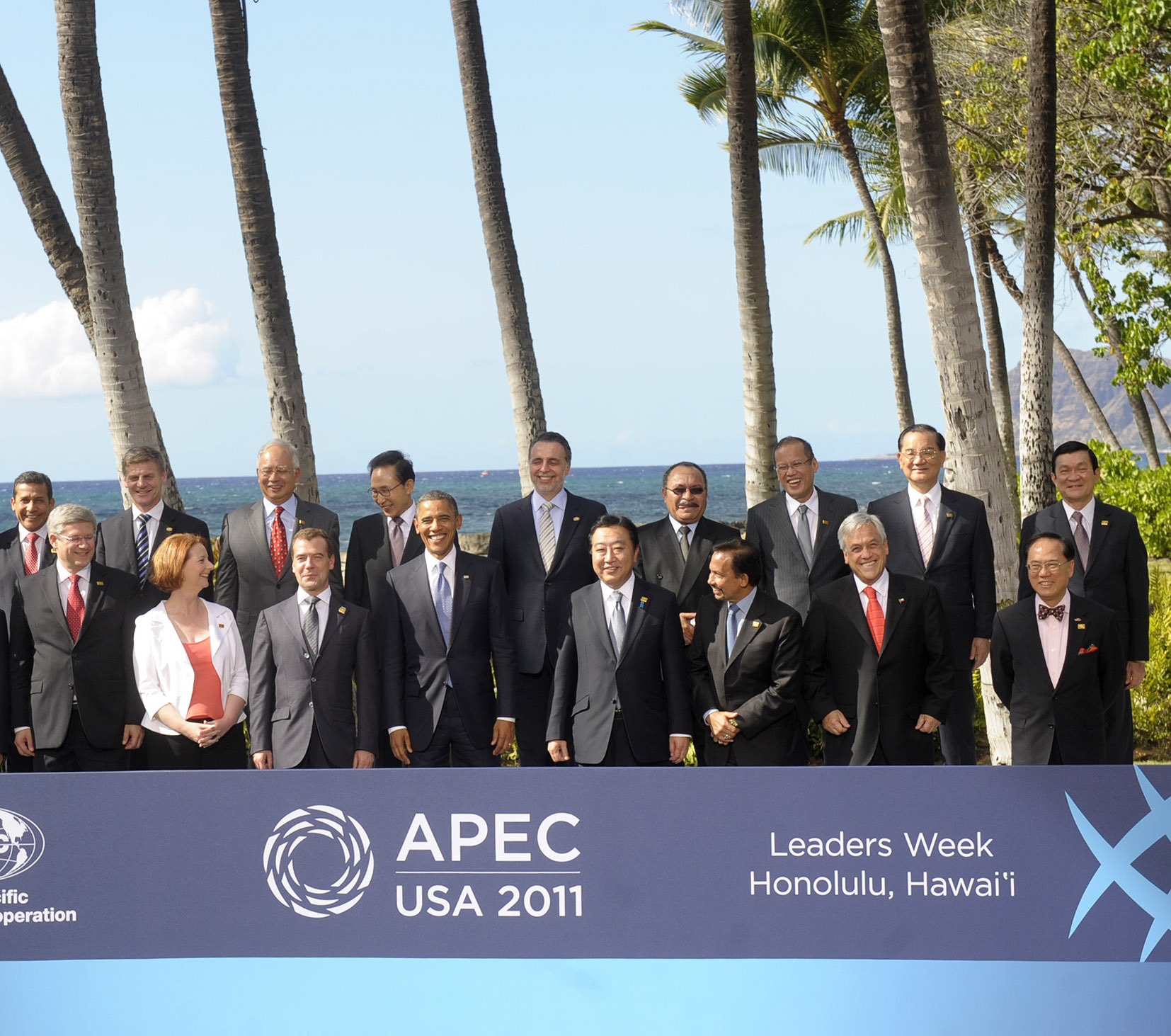 11-11-11 Cumbre Líderes APEC 2011